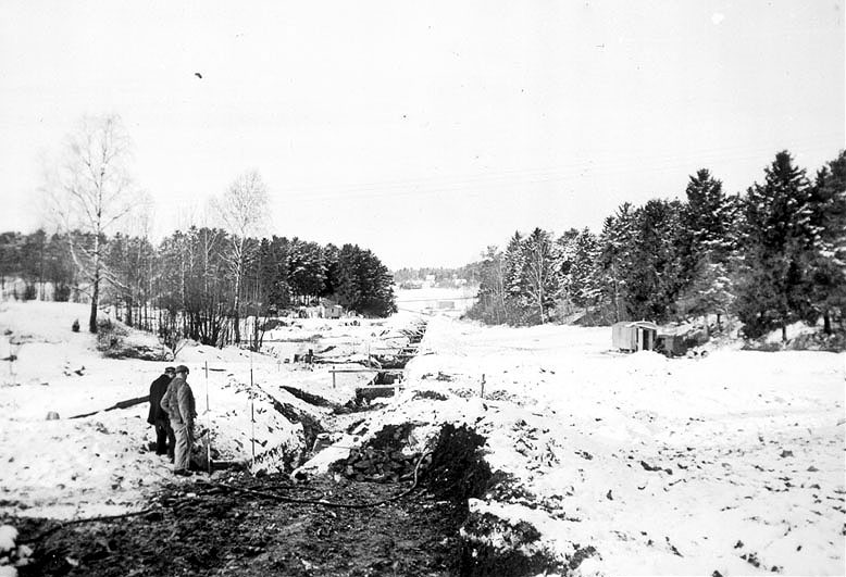 Anläggningsarbeten för Doktor Abrahams Väg i Eneby småstugeområde